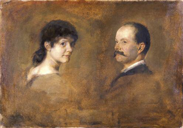 Retrats d'Alfred i Hedwig Pringsheim (nascuda Dohm) per Franz von Lenbach